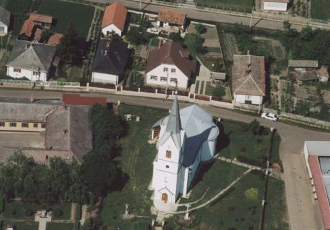 Tiszavasvári, Hungary, aerialphotography